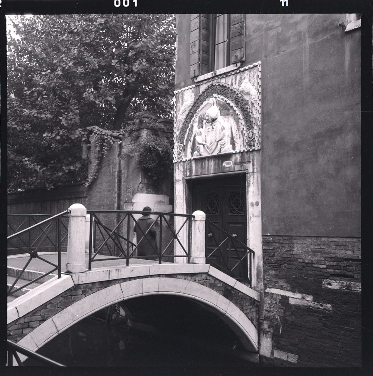 Servizio fotografico : Venezia, 1970 / Paolo Monti. - Buste: 21, Fototipi: 21 : Negativo b/n, gelatina bromuro d'argento/ pellicola ; 6x6. - ((Serie costituita da 21 buste di negativi identificati con i nn.: 6226, 6227, 6228, 6229, 6230, 6231, 6232, 6233, 6234, 6235, 6236, 6237, 6238, 6239, 6240, 6241, 6242, 6243, 6244, 6245, 6246, e tenute insieme da una graffetta. - Occasione: Documentazione per pubblicazione. - Fonte: Monografia di Arslan, Edoardo: Venezia gotica: architettura civile gotica veneziana, Milano, Electa (1970)